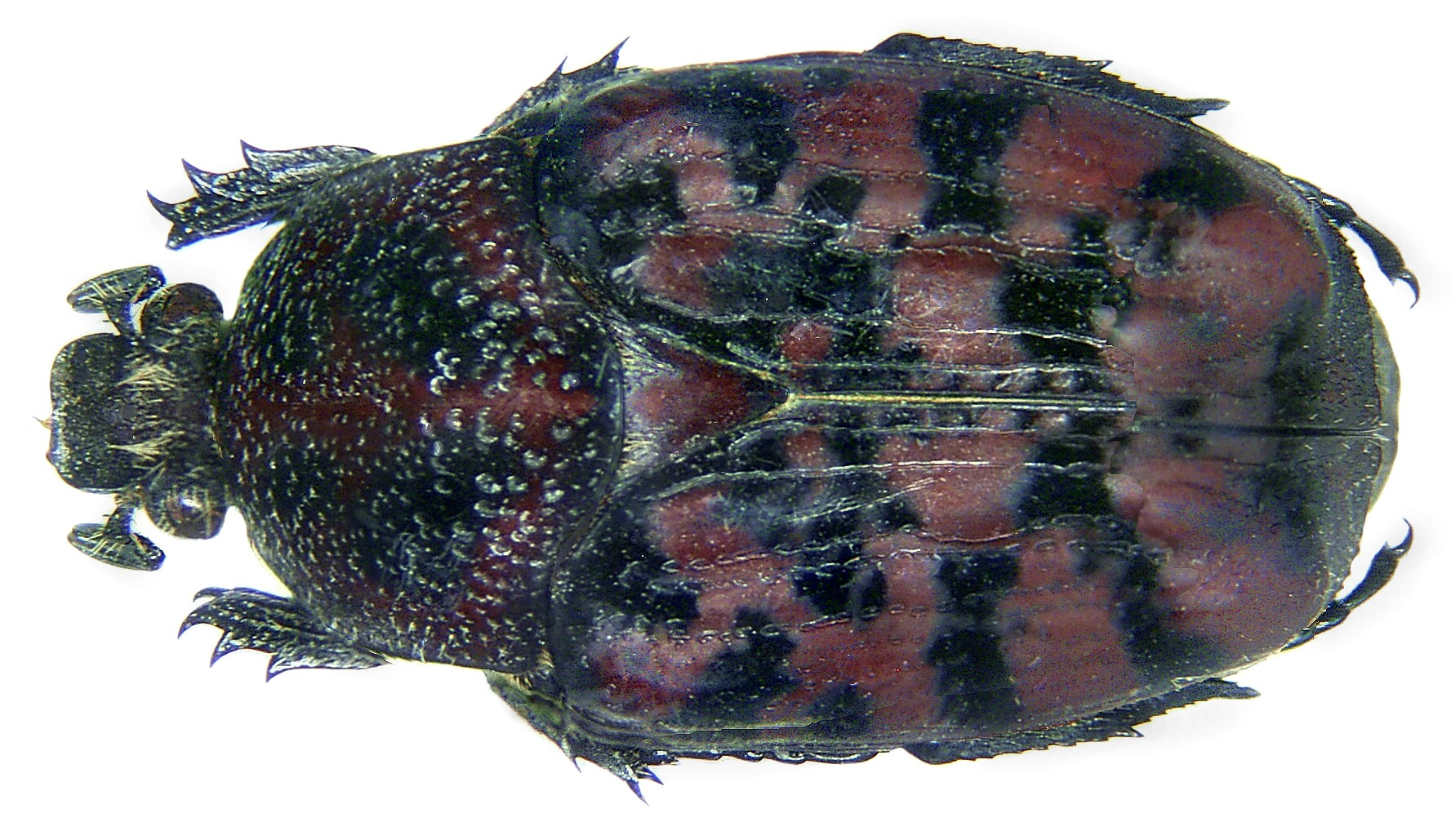 Familie: Scarabaeidae Grösse: 16 mm Fundort: Westafrika, Camerun, Bamenda Foto: U.Schmidt, 2006